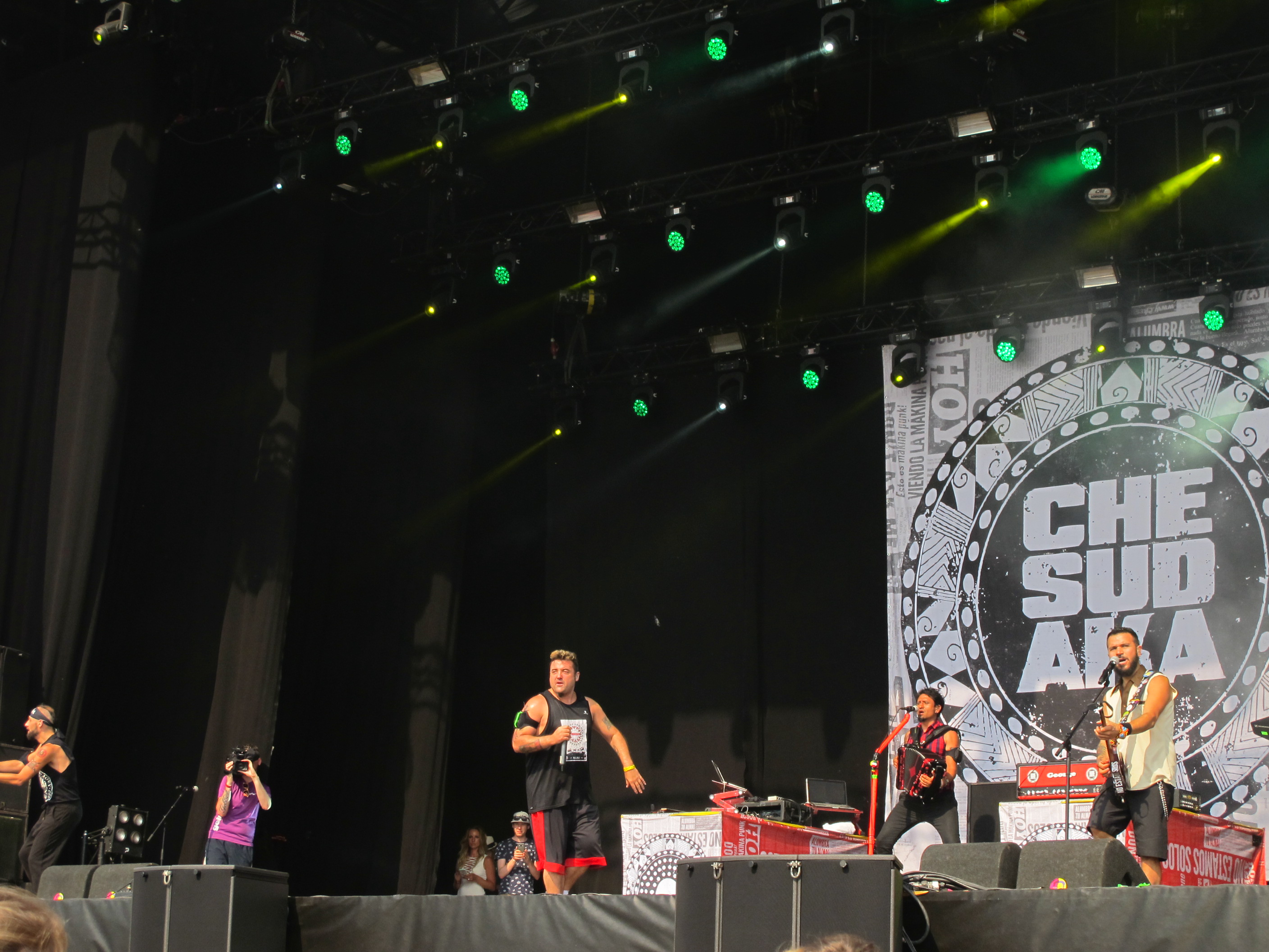 Che Sudaka op de Zwarte Cross 2016.